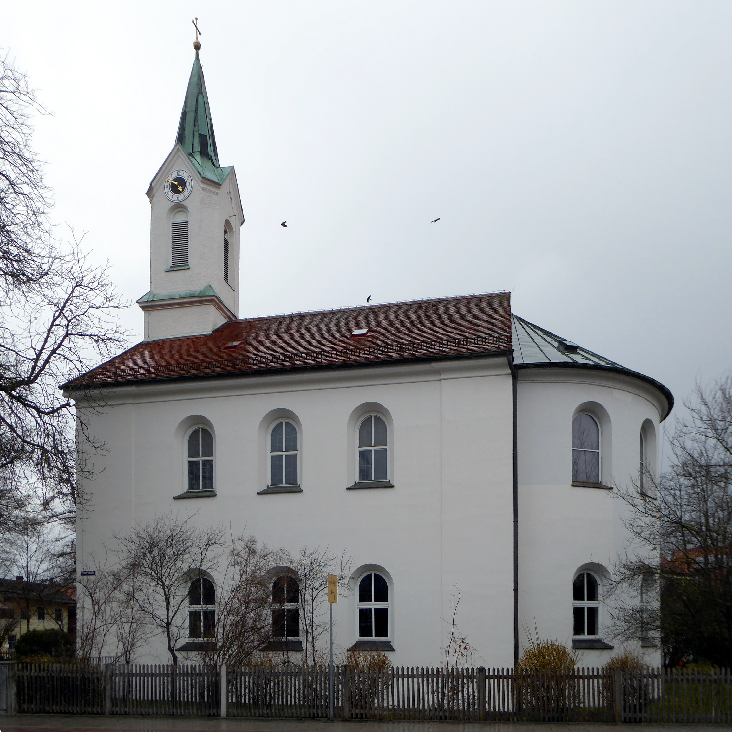 Feldkirchen (Lkr. München), die evangelisch-lutherische Kirche von Südosten gesehen.